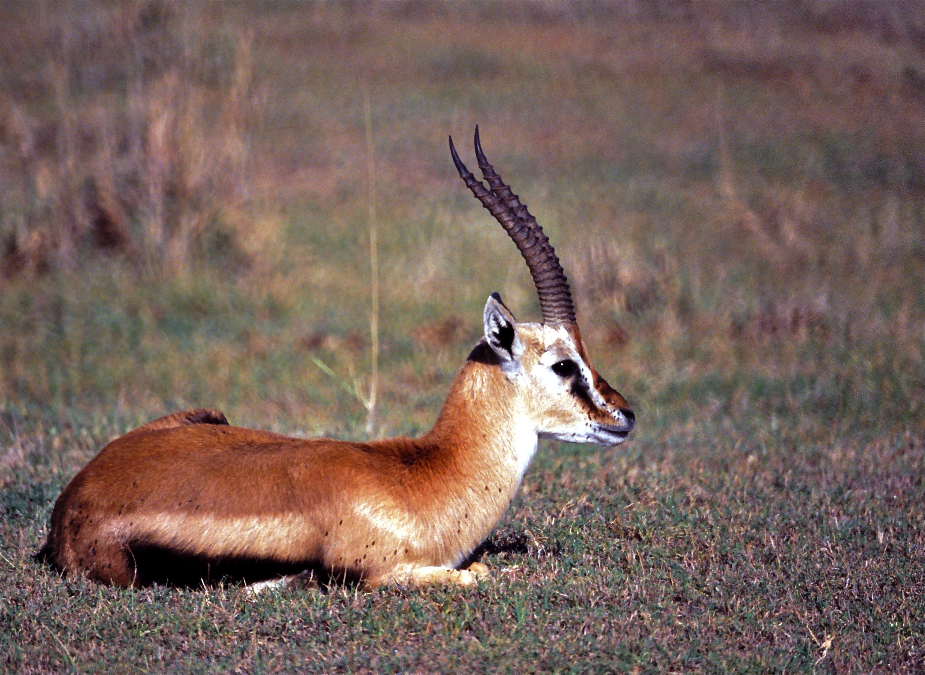 Lake Nakuru NP, KENYA Scanned slide from 2004